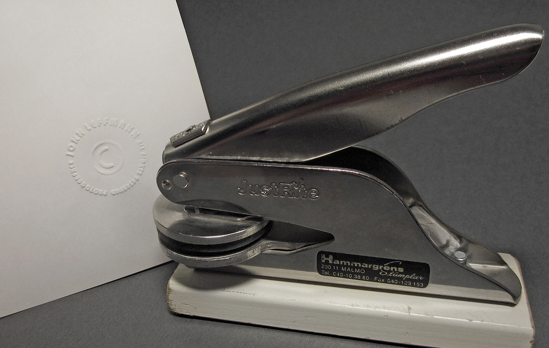 En Vitprägel för prägling av fotografisk bild eller grafikblad.